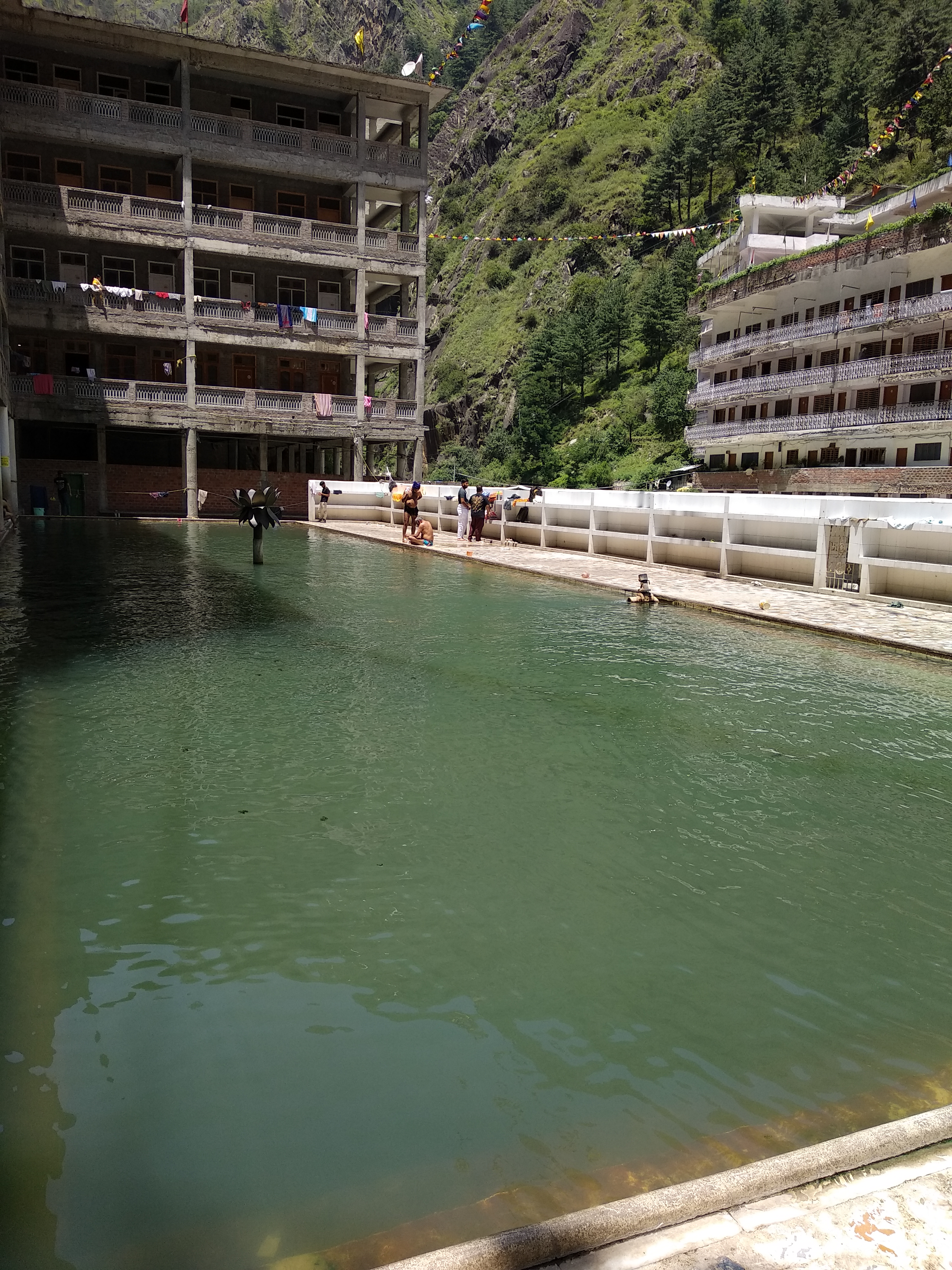 Hot water spring at Manikaran